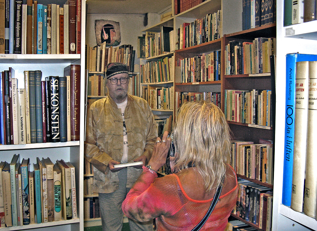 Lars Jannedal i sitt antikvariat i Ystad 2008.